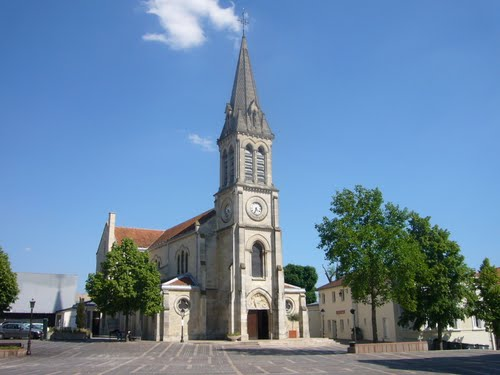 Photographie de l'Eglise Saint Louis de Garches, France